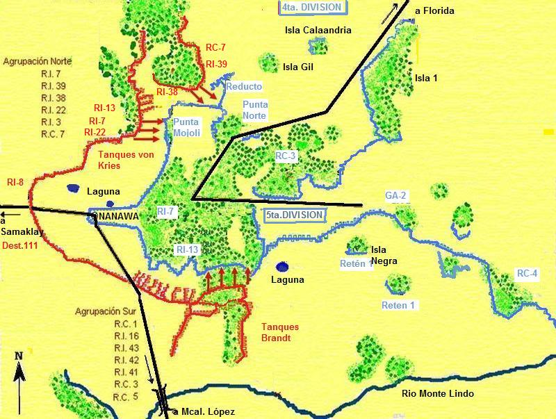 Mapa Segunda batalla Nanawa julio 1933 - Guerra del Chaco